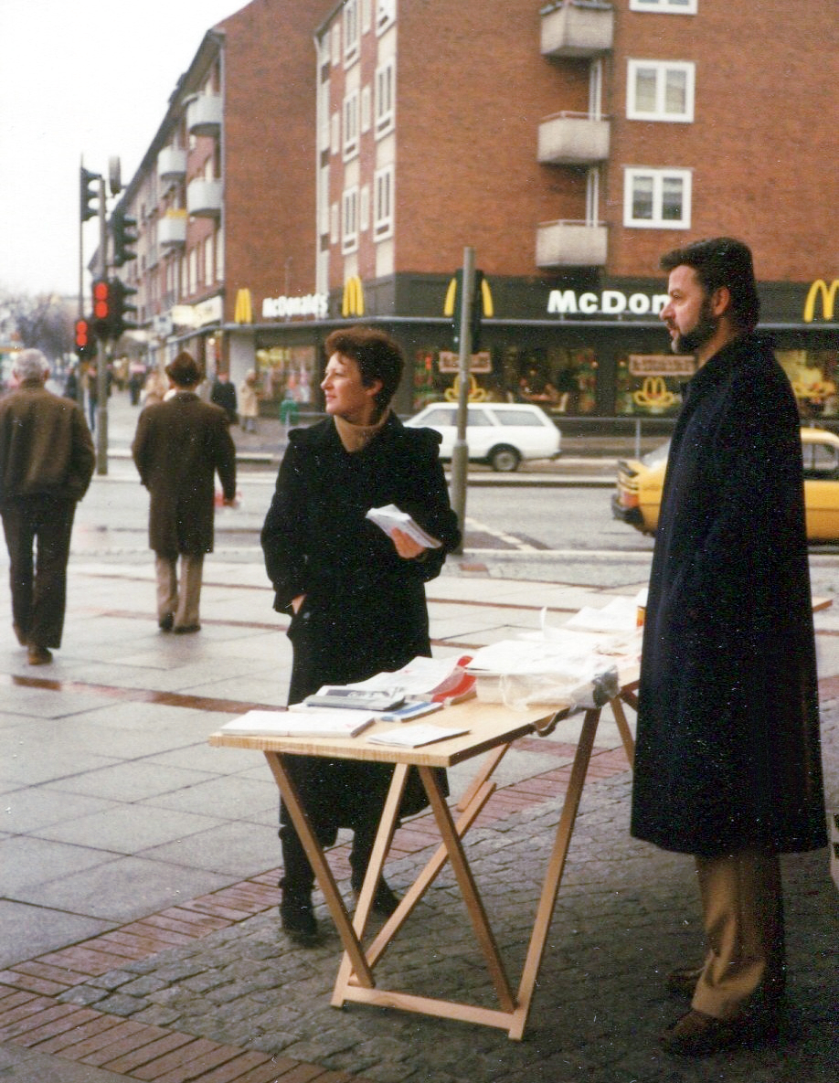 Ulrich Hartmann, SPD Bürgerschaftsabgeordneter 1979 auf einem Wahlkampfstand der SPD in Hamburg-Uhlenhorst